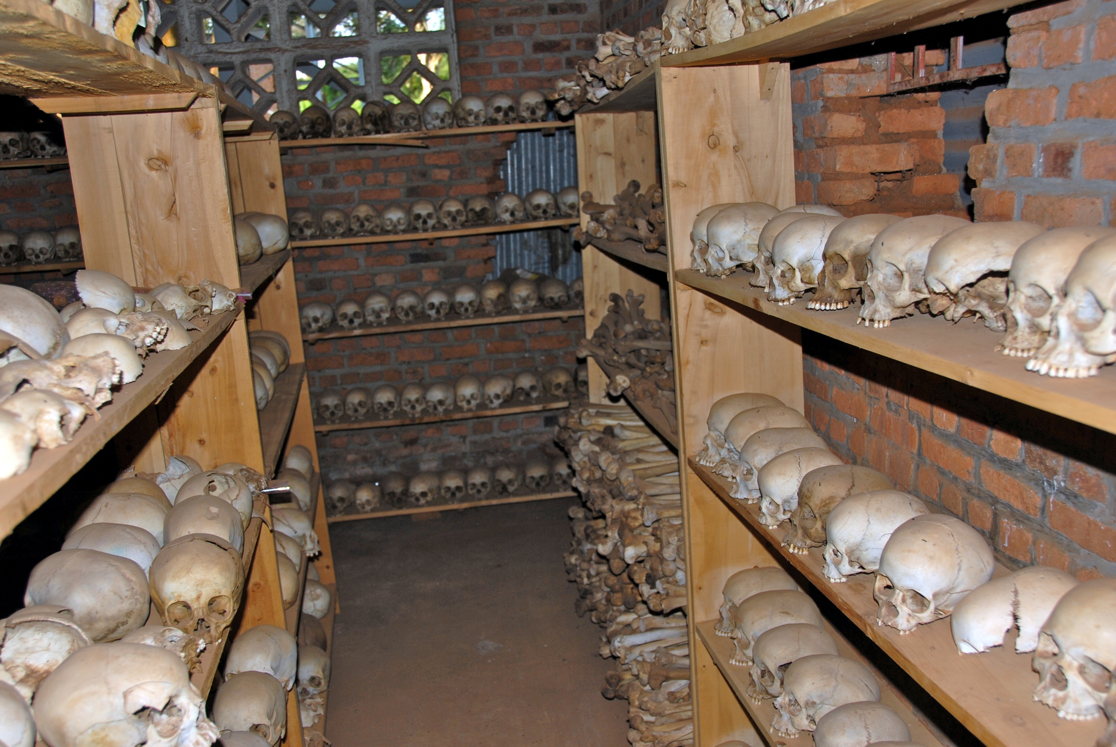 Ntarama Church Genocide Memorial